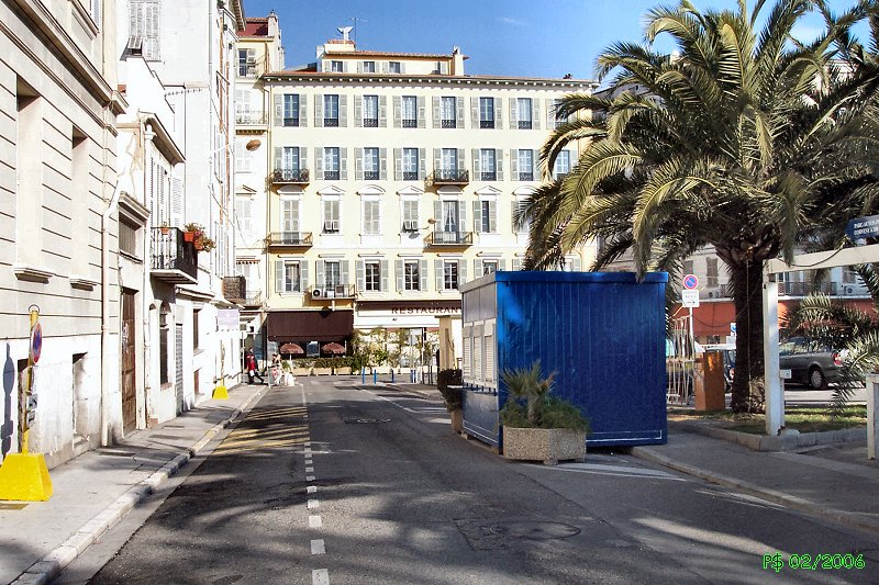 Nice - Vieille Ville Vue Sud-Nord, de la Promenade vers la rue Saint François de Paule (sens de la circulation) A droite, le parking qui fait l'objet d'une "affaire" locale.